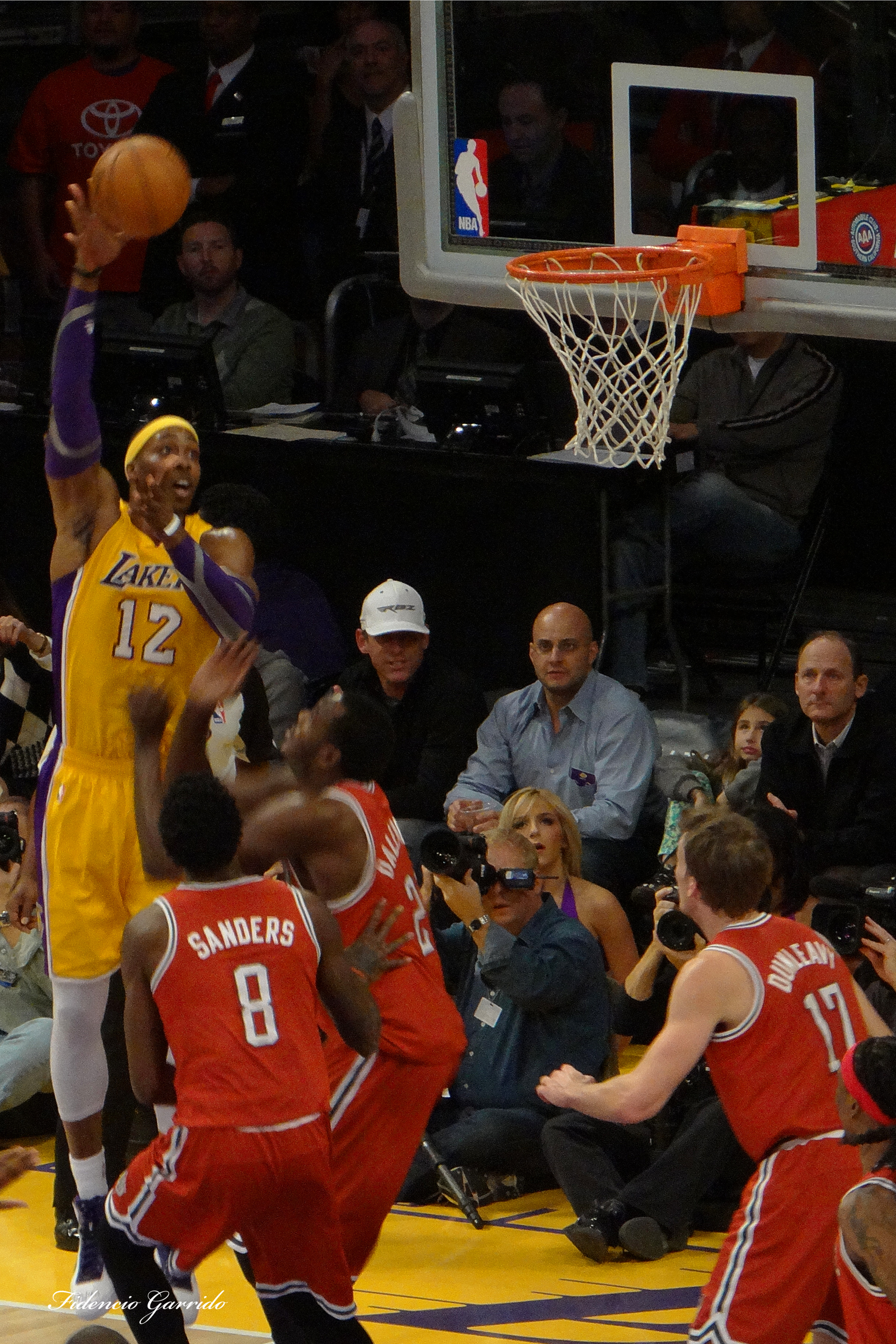 Bucks @ Lakers Staples Center 1/15/2013